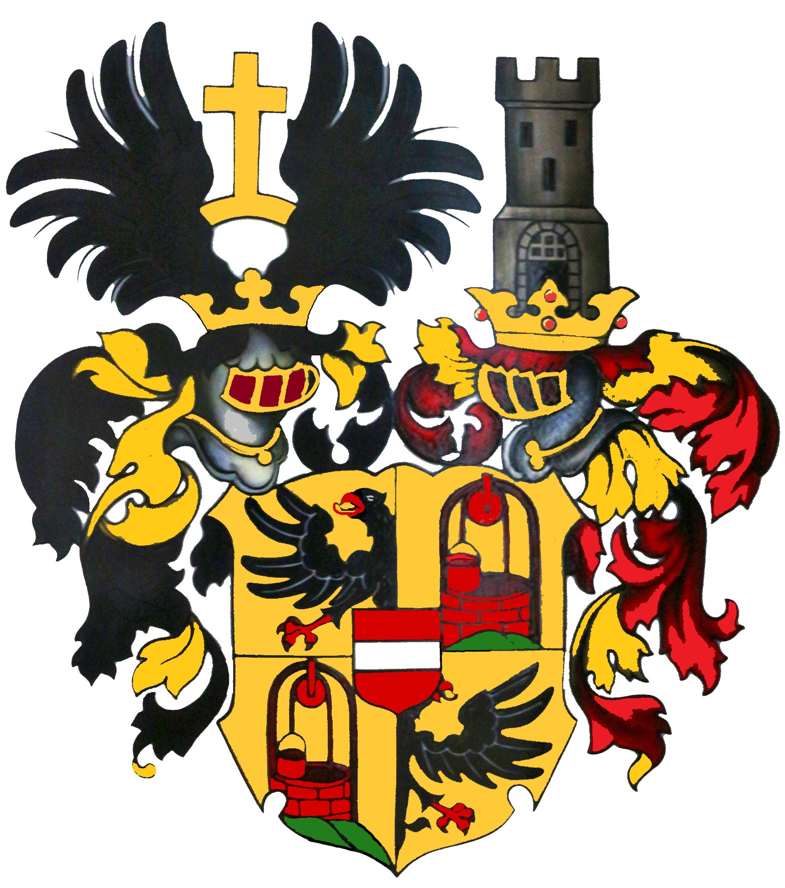 Erb rodu Putzů z Adlersthurnu